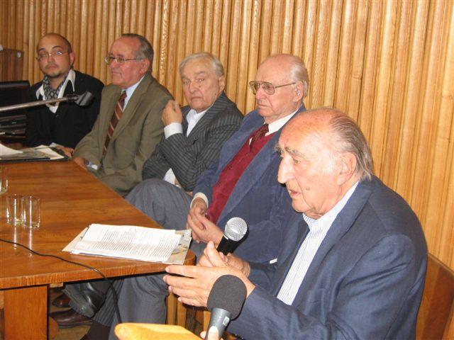 Leopold Unger (1922-2011), Polish journalist, Janusz Krasiński (1928-2012), Polish writer, Ludwik Jerzy Kern (1920-2010), polish writer and journalist, Wojciech Giełzyński (1930-2015), Polish journalist